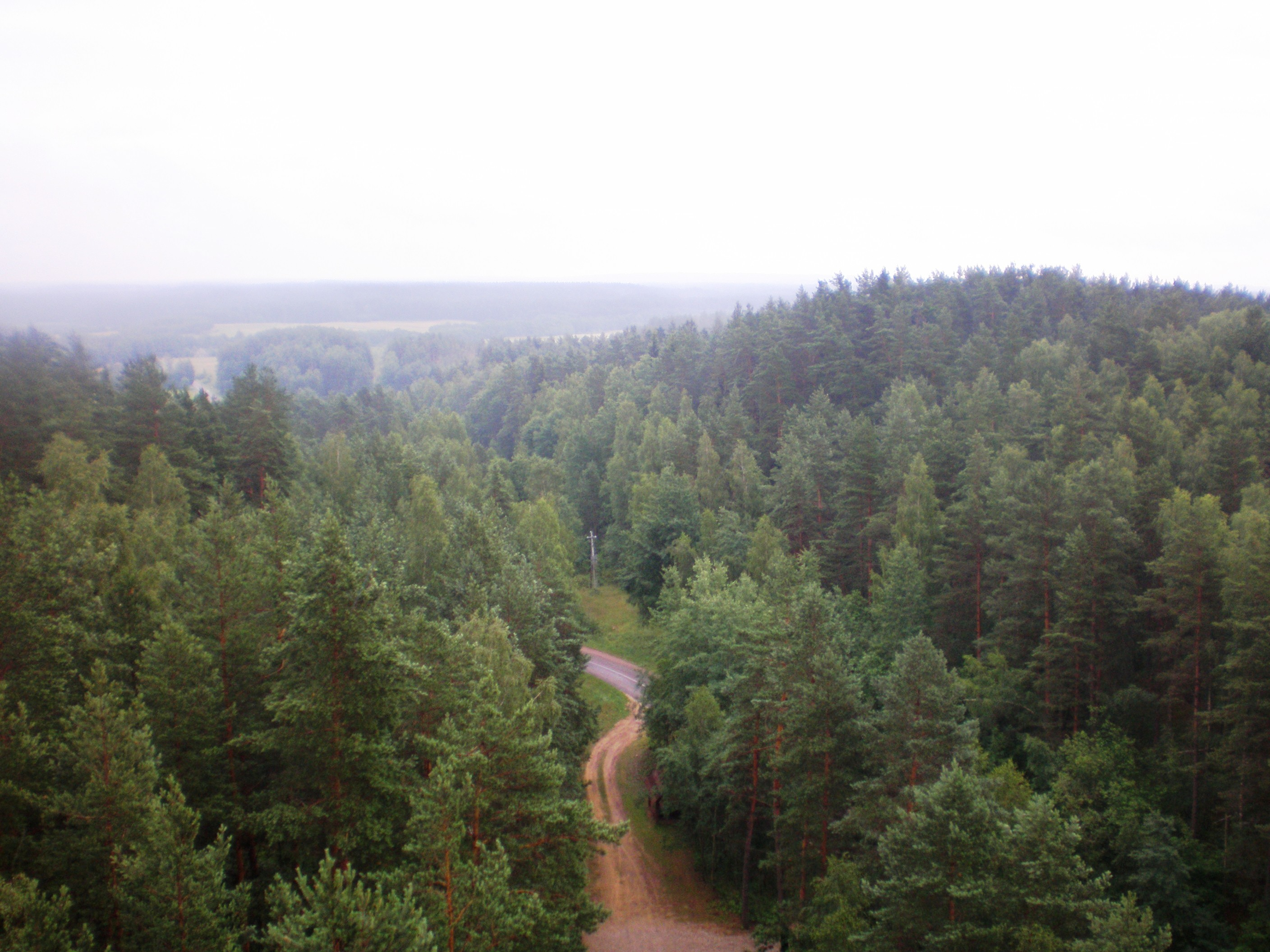 Forests in Aukštaitija NP